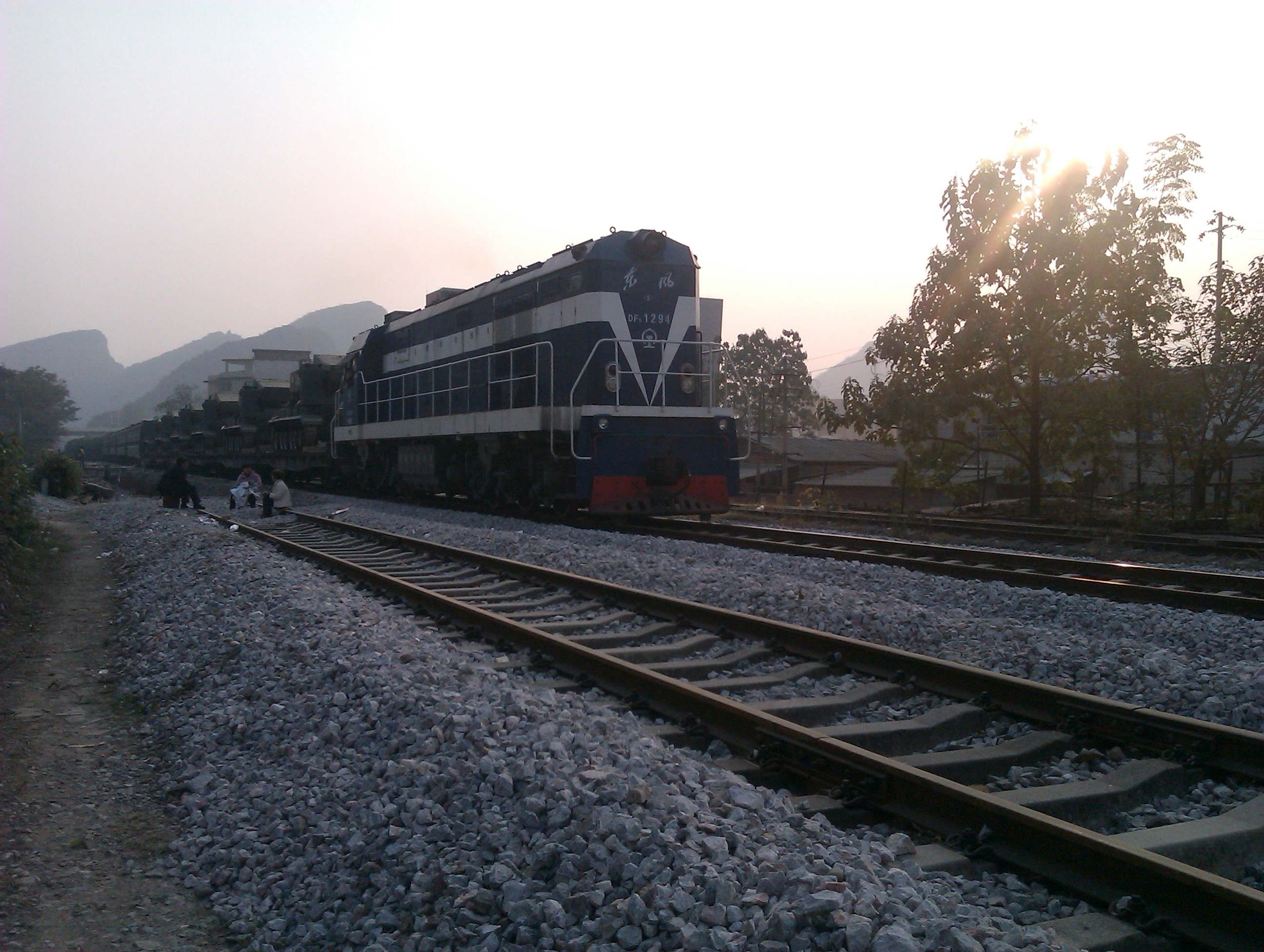 风五小调1294牵引一列军用列车前往桂林站